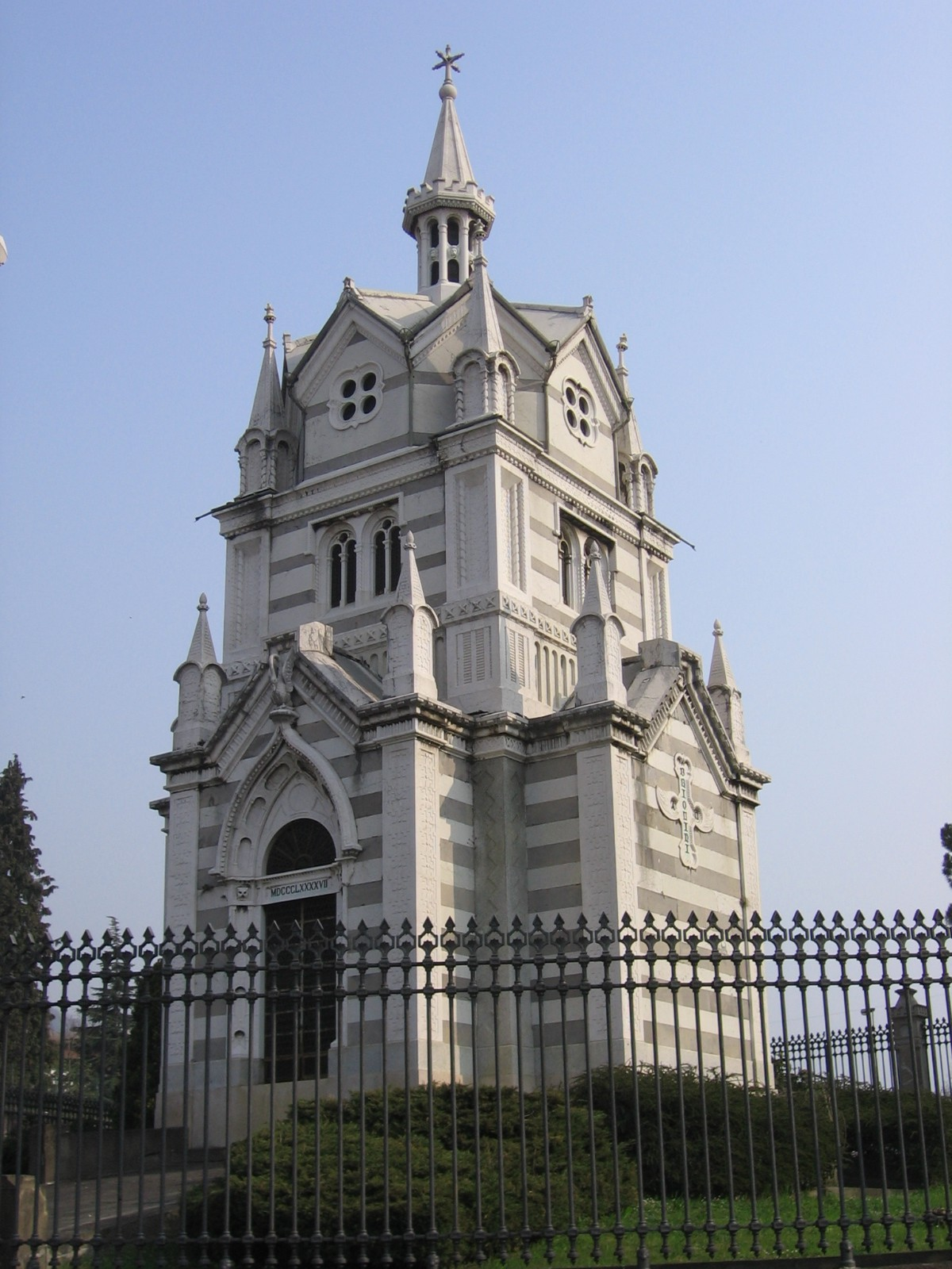 Gazzaniga, Bergamo, Italia